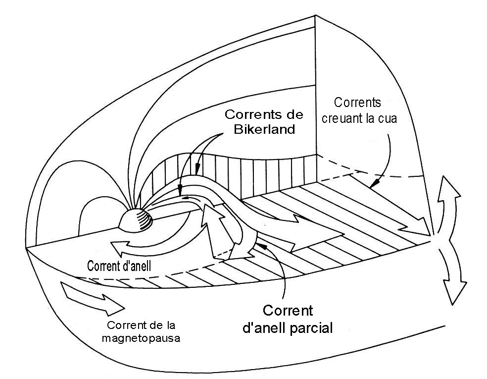 Esquema dels corrents de la magnetosfera